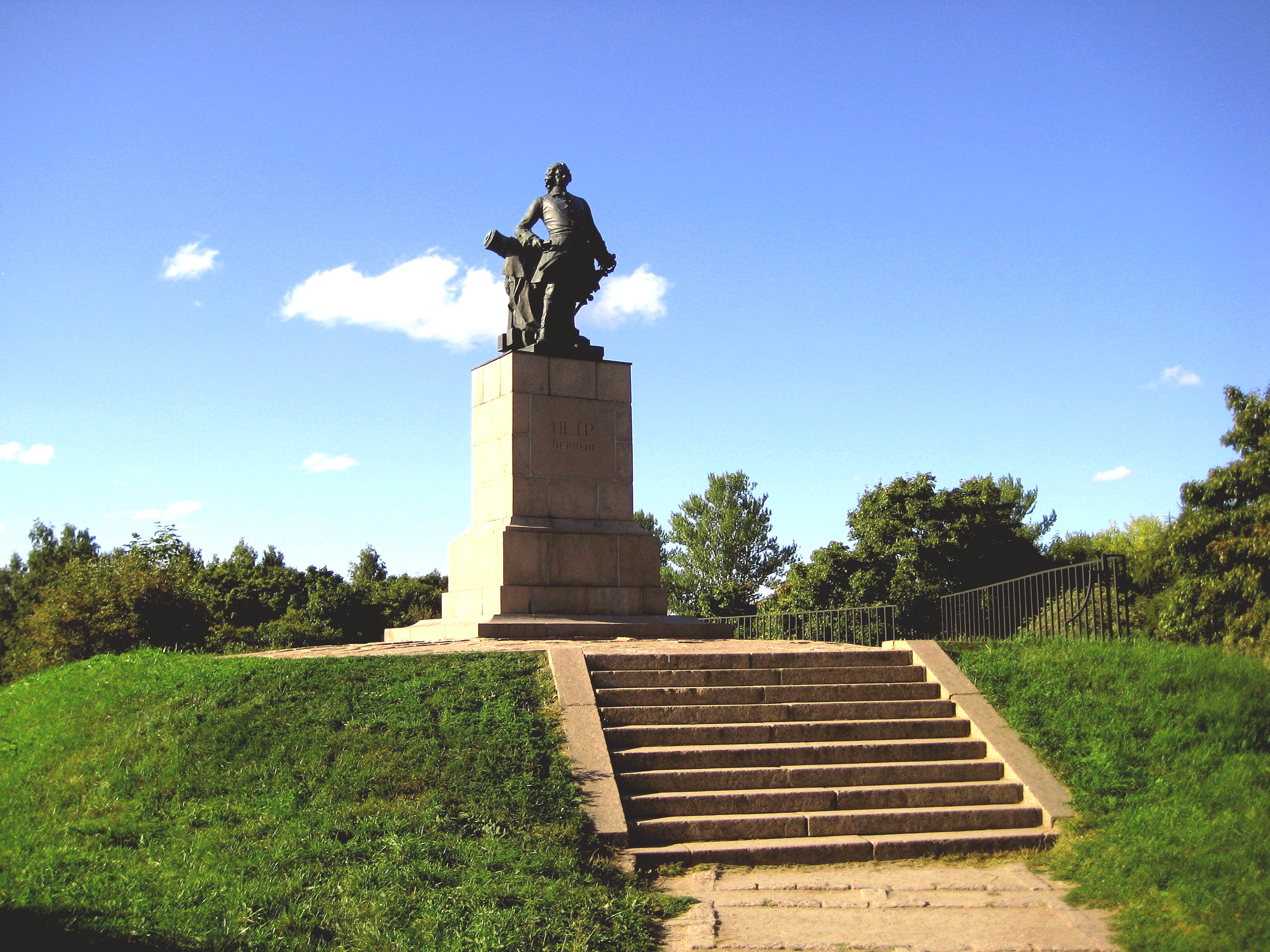 Выборг. Памятник Петру I на Петровской горе